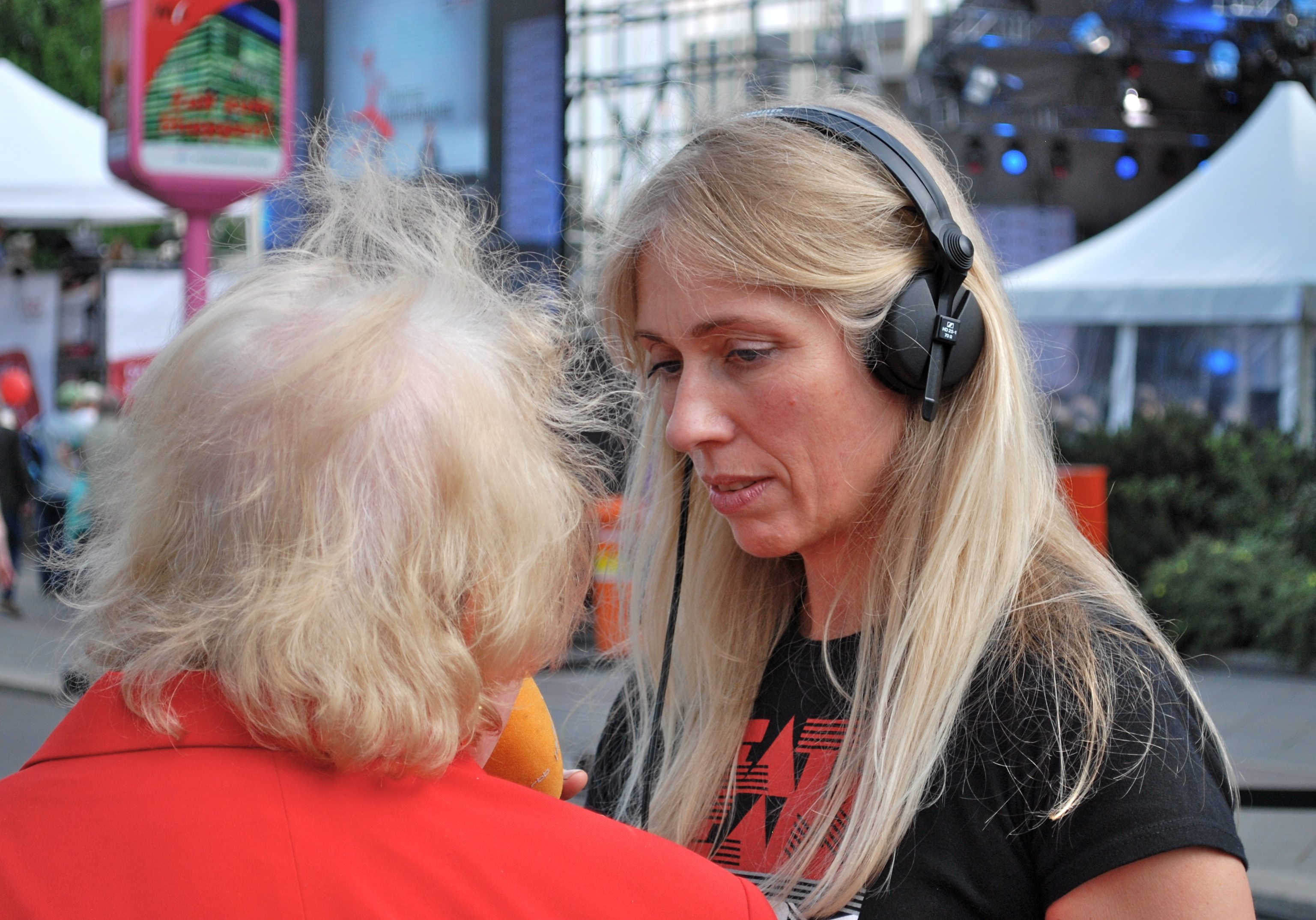 Anja Caspary, 2013 (Live auf Sendung, Bericht über 10 Jahre rbb: DAS FEST)